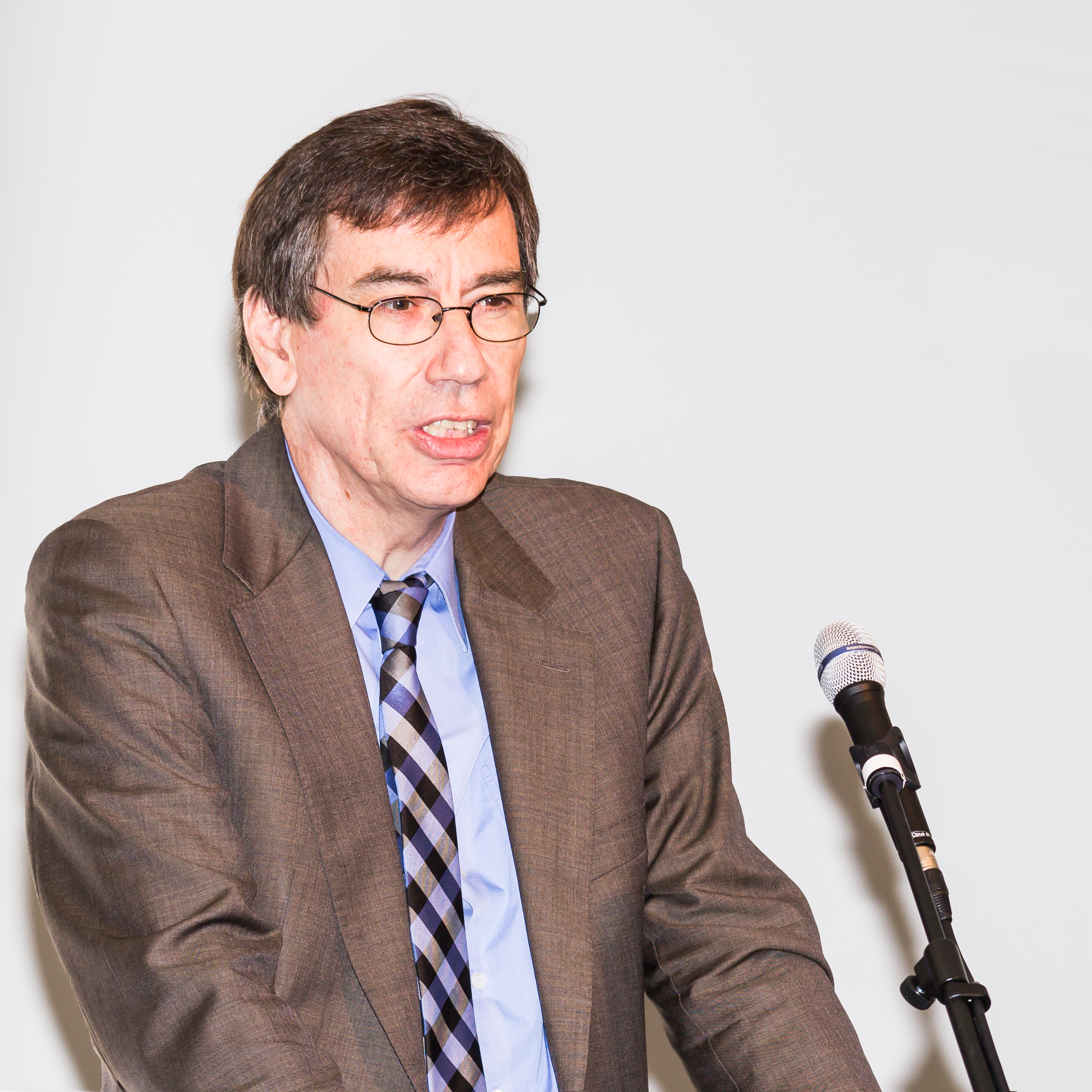 11. Nationaler Aktionstag für die Erhaltung schriftlichen Kulturguts. Motto: „Zusammen sind wir stark! Bestandserhaltung im Verbund“. Veranstaltungsort: FORUM VHS im Kulturquartier am Neumarkt, Köln Foto: Dr. Günter Winands, Ministerialdirektor bei der Beauftragten der Bundesregierung für Kultur und Medien